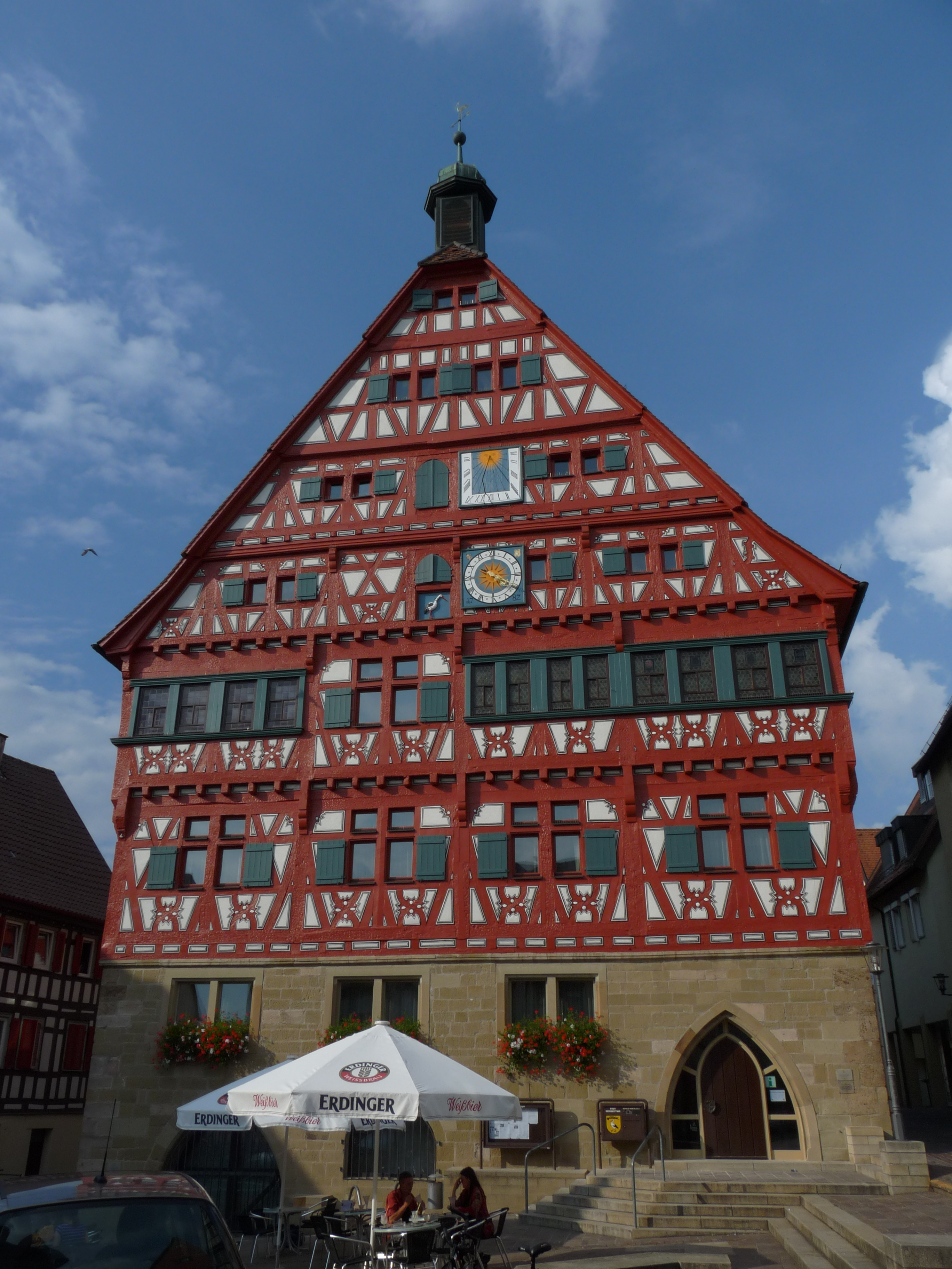 Großbottwar - Rathaus - Fassade